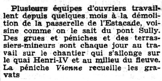 Fragment d'un article sur un fait-divers. Ce fragment indique l'état d'avancement de la démolition de la passerelle de l'Estacade à Paris. Le Petit Parisien 23 juillet 1932, page 1, 6ème colonne.